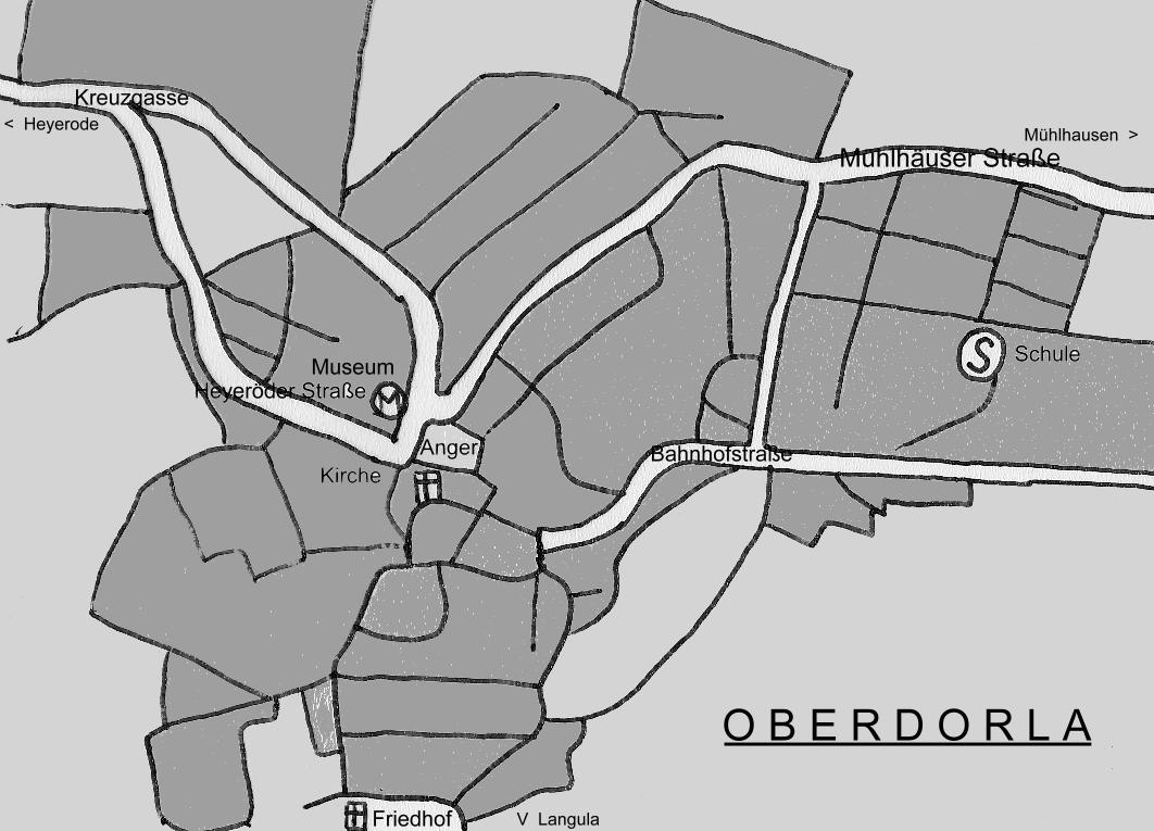 Kartenskizze von Oberdorla nach einer Vergrößerung der Topographischen Karte 1 : 25000, Blatt 4828.